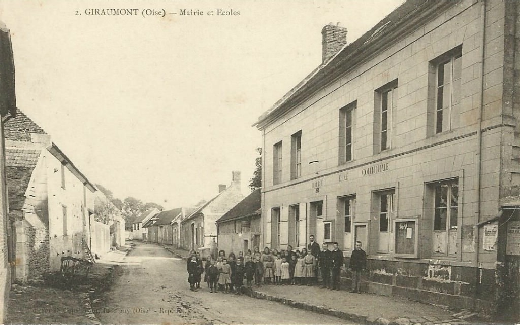 Carte postale du village vers 1910.